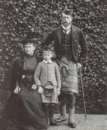 Princesa Irene de Hesse e da Prússia com o marido e o segundo filho